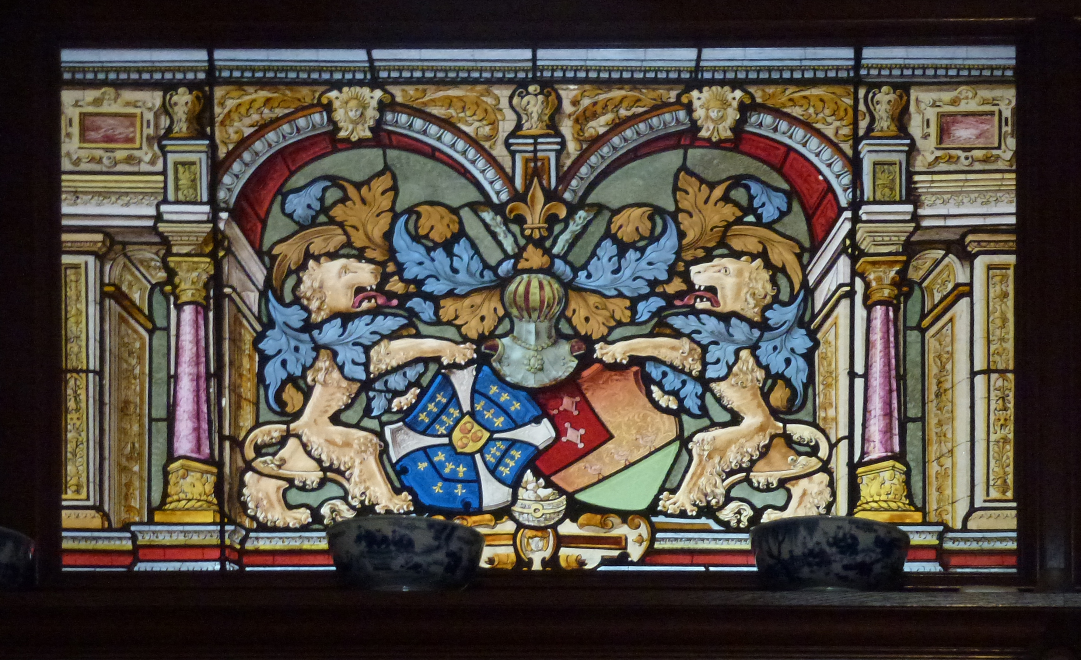 Een van de twee bijna identieke glas-in-loodramen die naast elkaar zijn opgehangen op de 1e verdieping van het museum aan de Hoogstraat 166 in Haastrecht